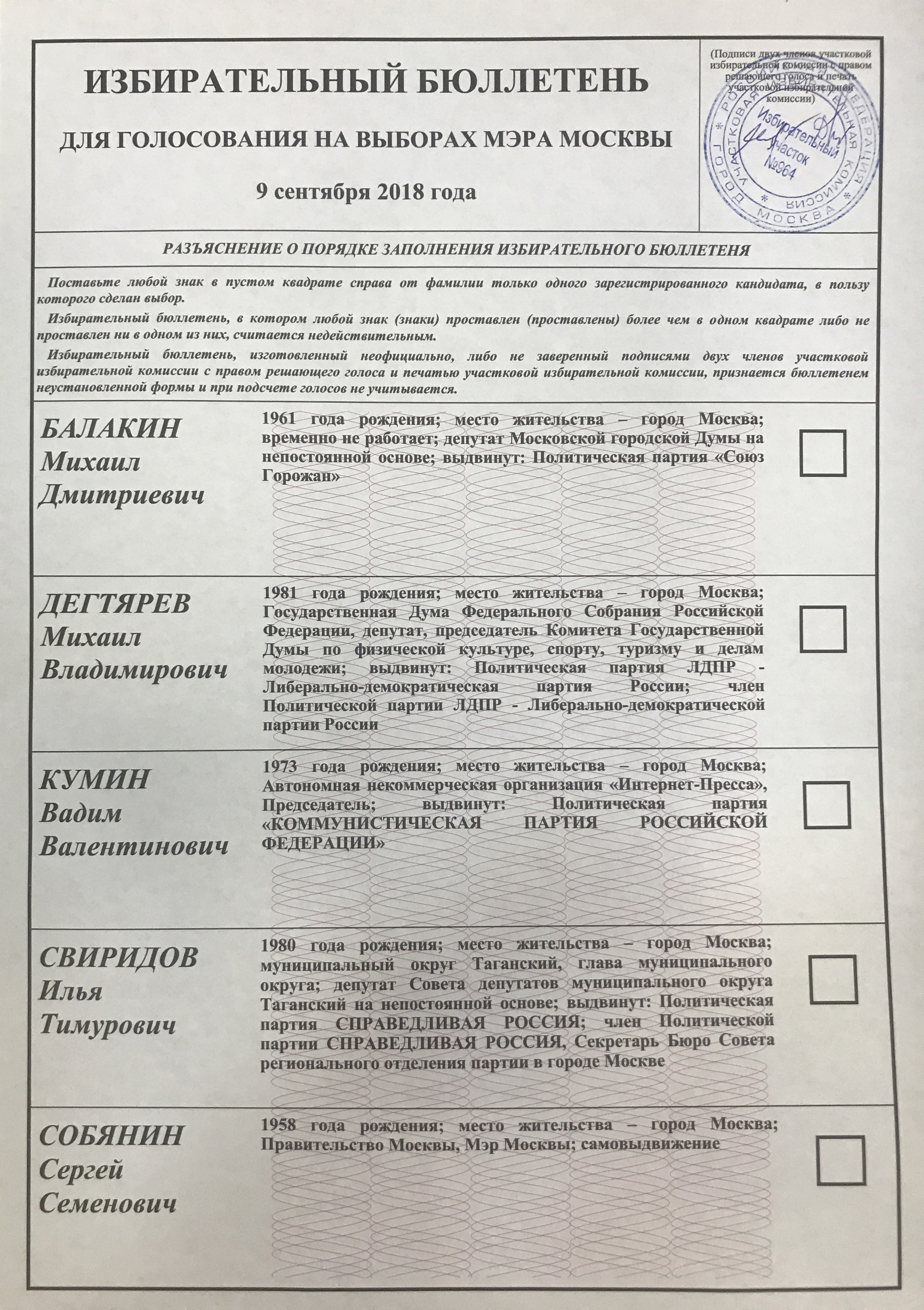 Избирательный бюллетень на выборах мэра Москвы 2018